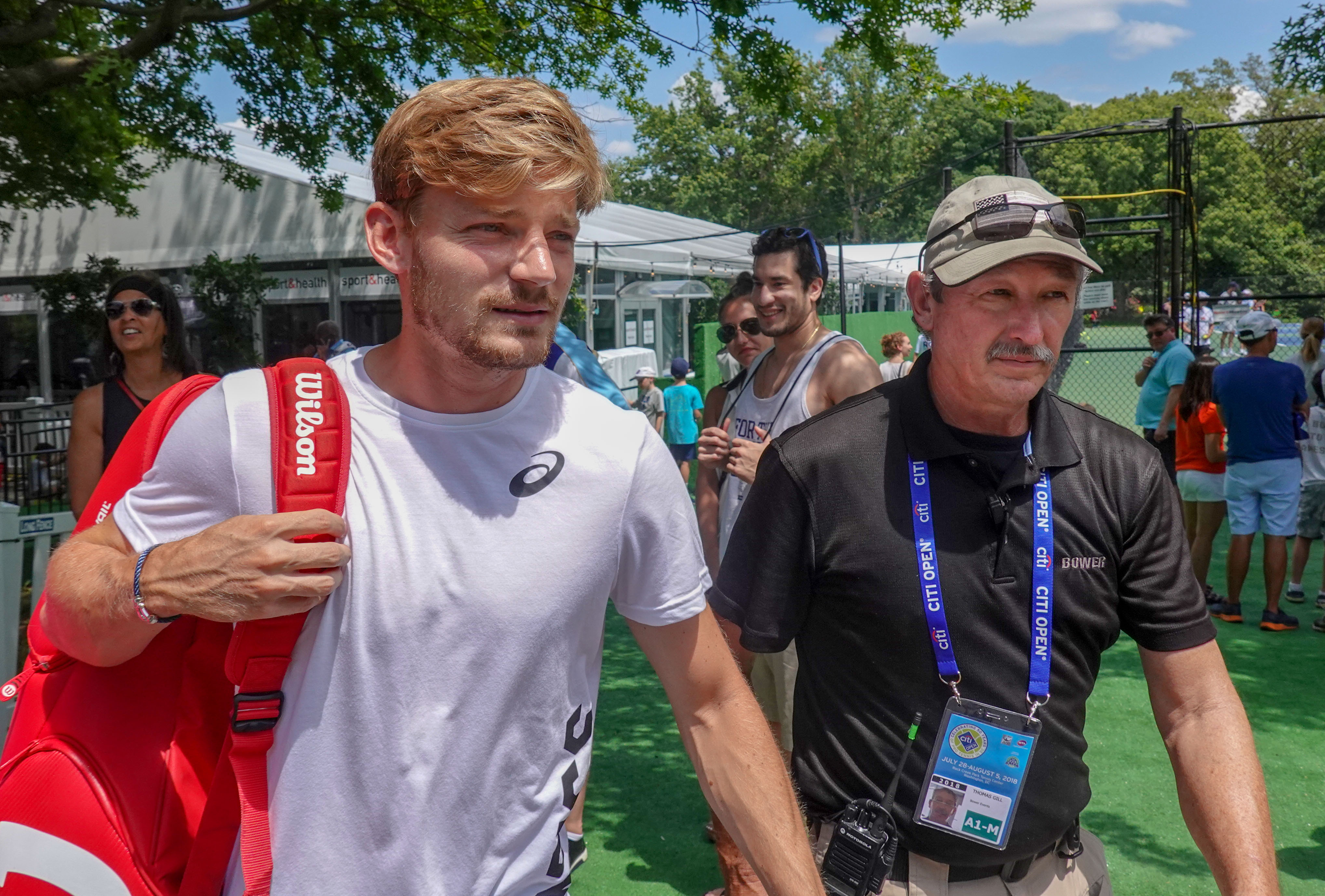 2018 Citi Open Tennis